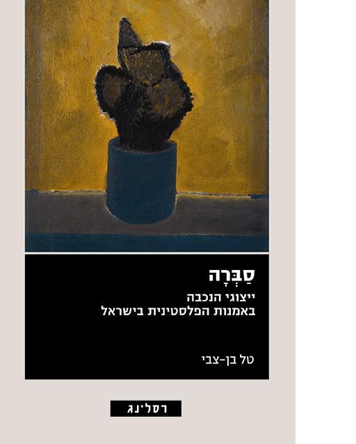 סַבְּרָה ייצוגי הנכבה באמנות הפלסטינית בישראל, הוצאת רסלינג